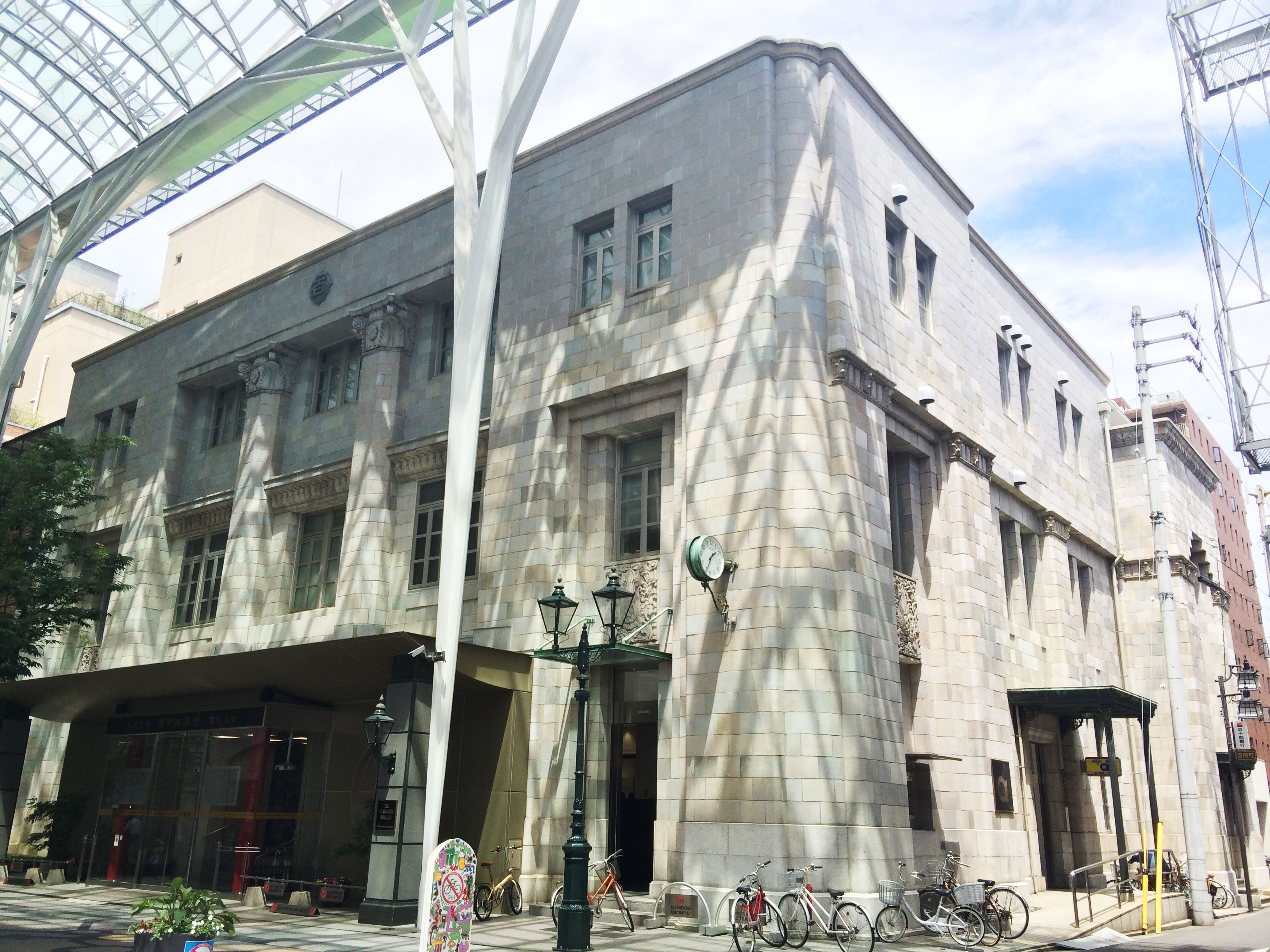 香川県高松市丸亀町15番地7にある百十四銀行高松支店。 沿革 1966年（昭和41年）11月21日 - 現在地（本店跡）に開設、日本銀行国債代理店業務開始。 1978年（昭和53年）3月20日 - 協和銀行高松支店の営業譲り受けにより業務継承。 1985年（昭和60年）2月19日 - 外国為替業務開始。 2012年（平成24年）9月20日 - 耐震化工事に伴い同敷地内の仮店舗に移転。 2013年（平成25年）9月17日 - 耐震化工事完成により元位置に改築移転。 （典拠：株式会社百十四銀行 調査部歴史資料グループ編『百十四銀行百二十五年誌』株式会社百十四銀行、2005年）